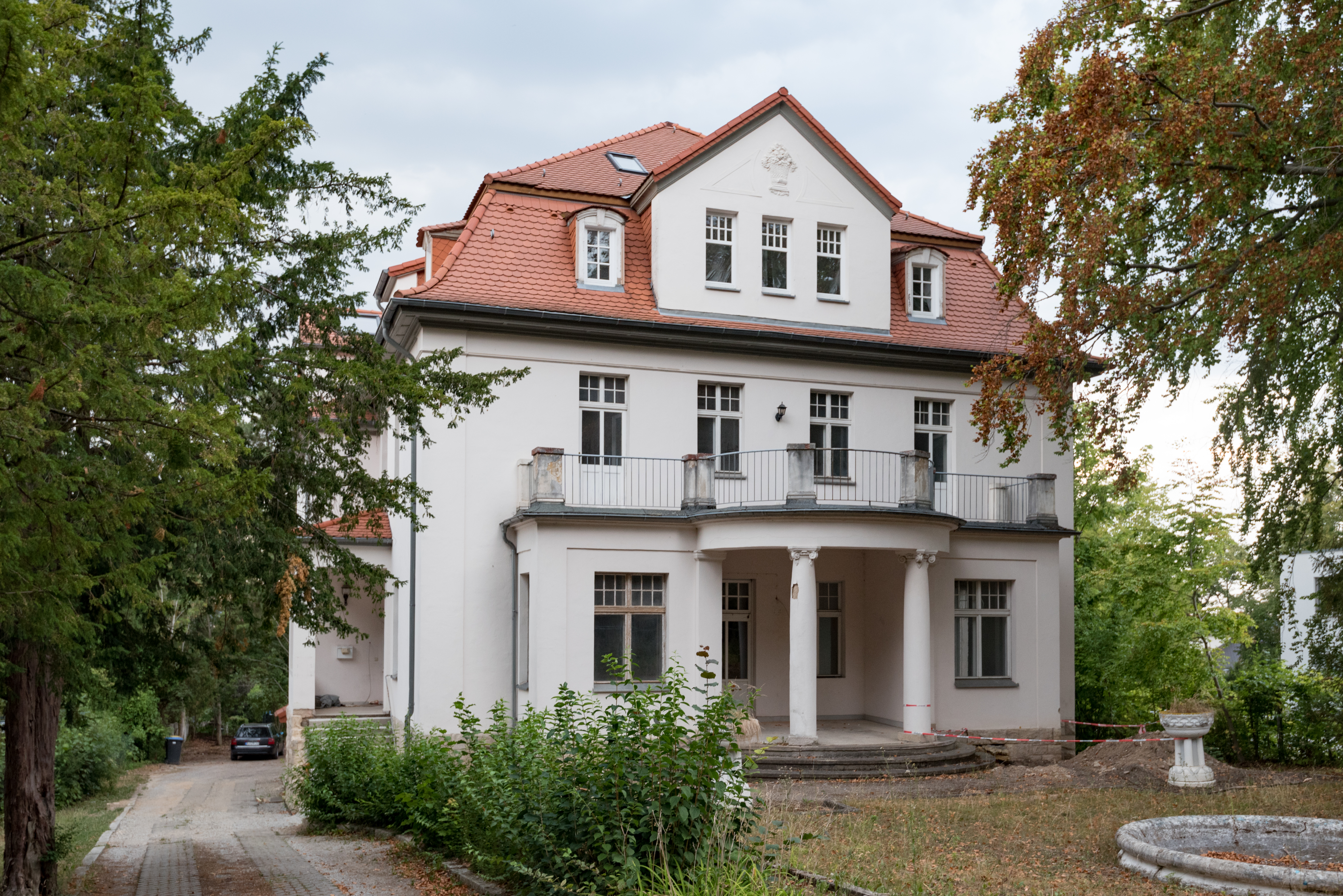 Naumburg (Saale), Hochstraße 2